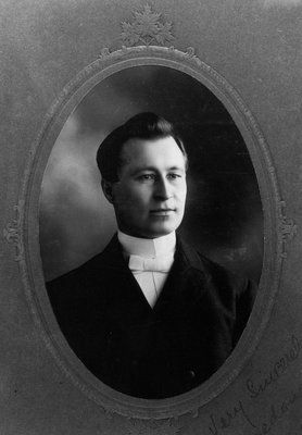 Ewan MacDonald, le mari de Lucy M. Montgomery, en 1900.